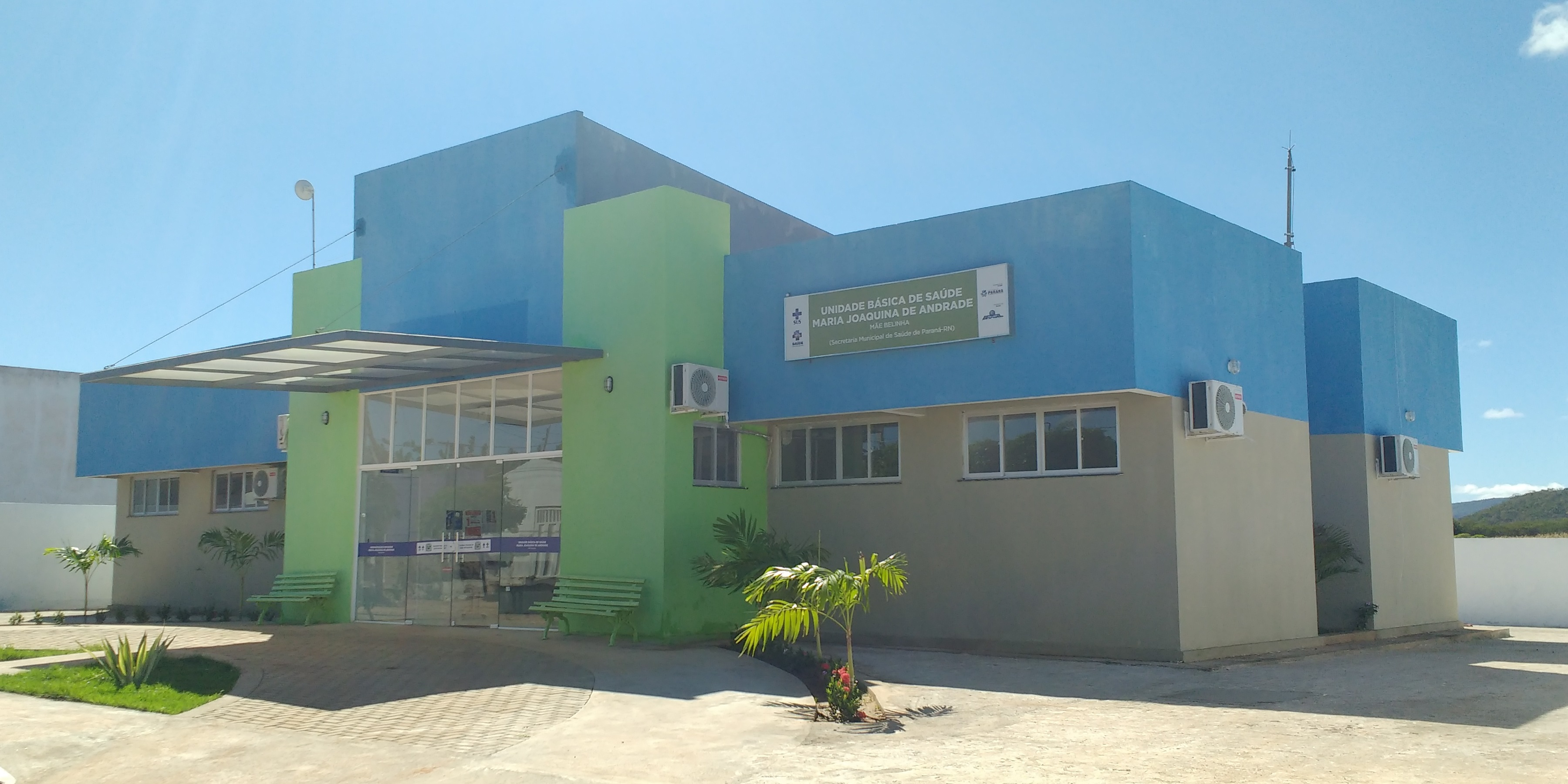 Unidade Básica de Saúde Mãe Belinha em Paraná, Rio Grande do Norte (Brasil).